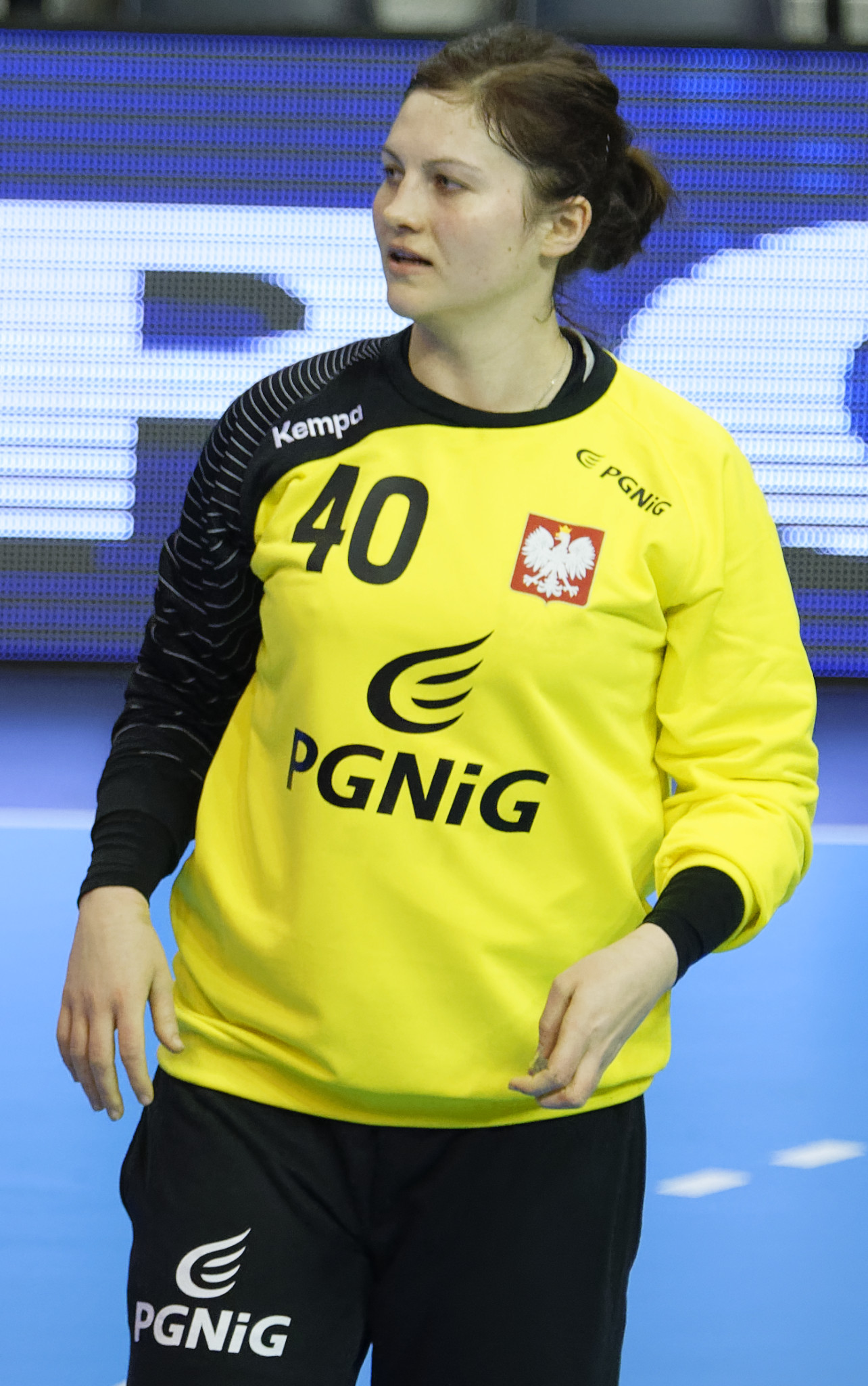 Rencontre en la Pologne et la norvège lors de la golden League de handball. A Dijon, le 19 mars 2015.